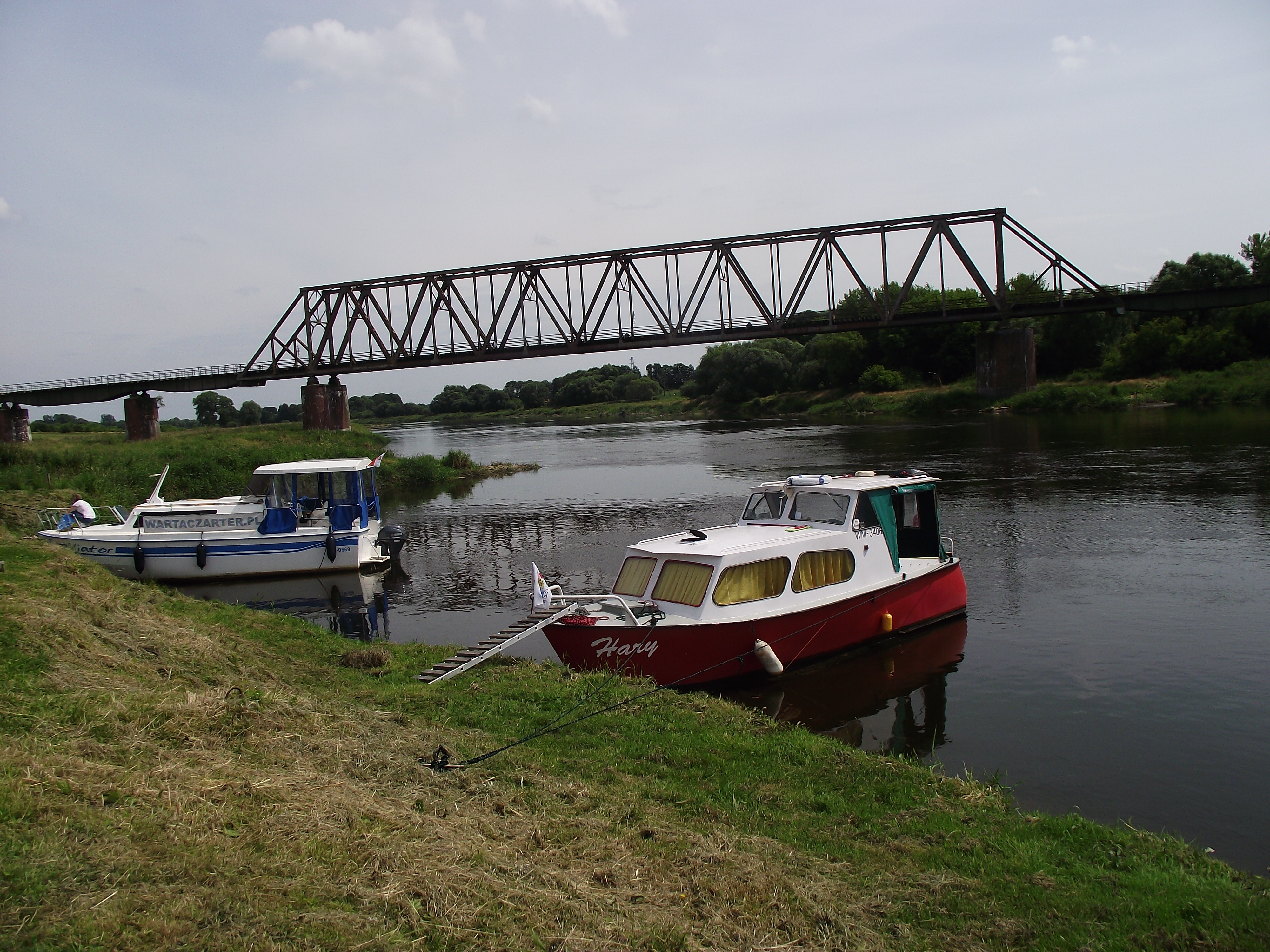 Postój na Warcie we wsi Stopnica